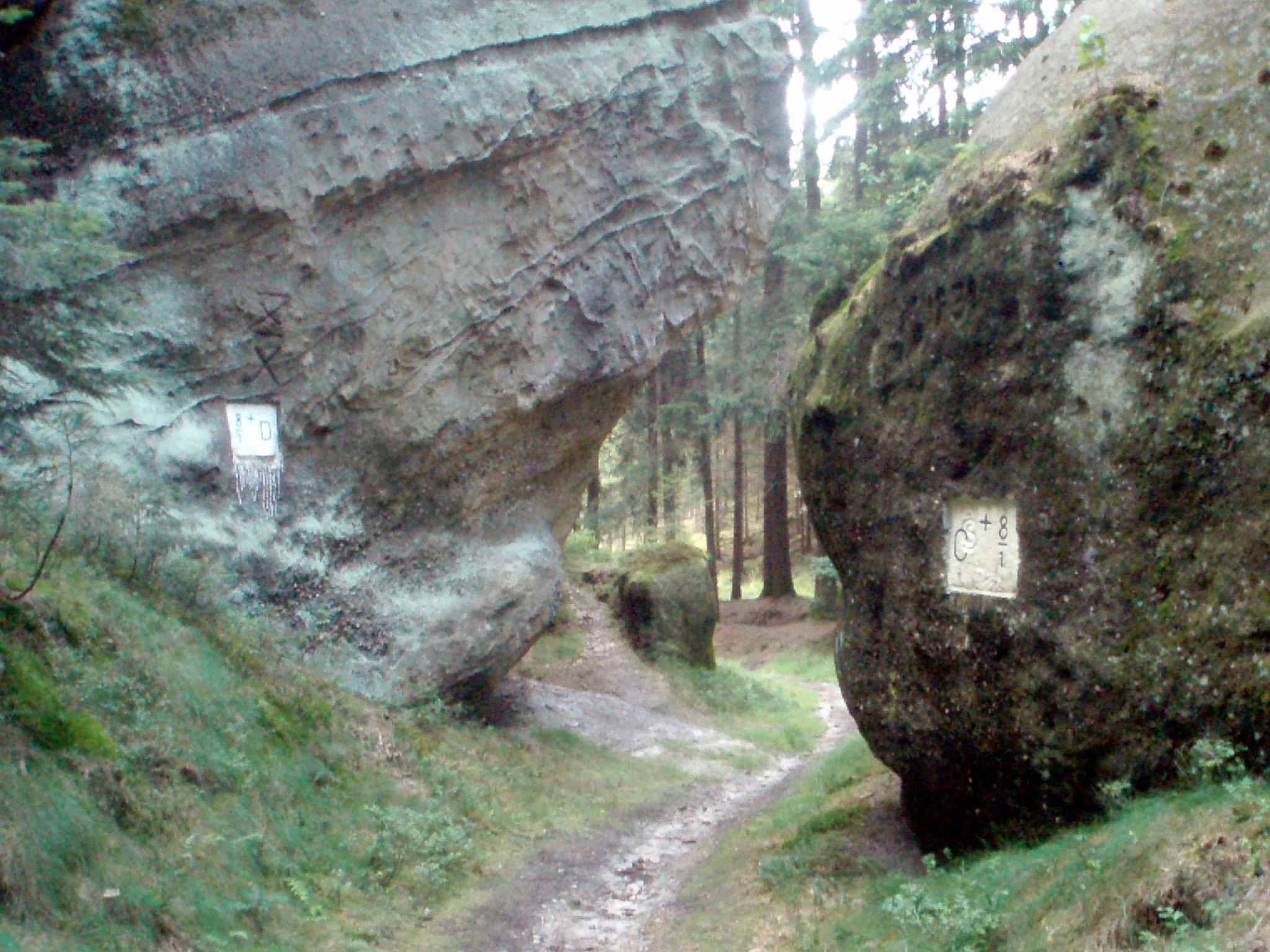 Böhmisches Tor